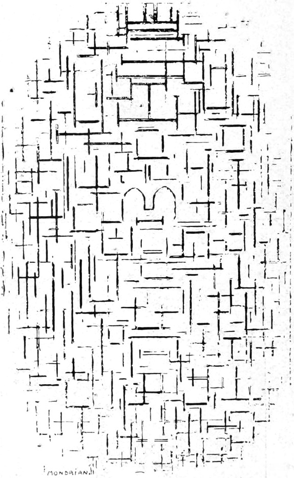 Tekening